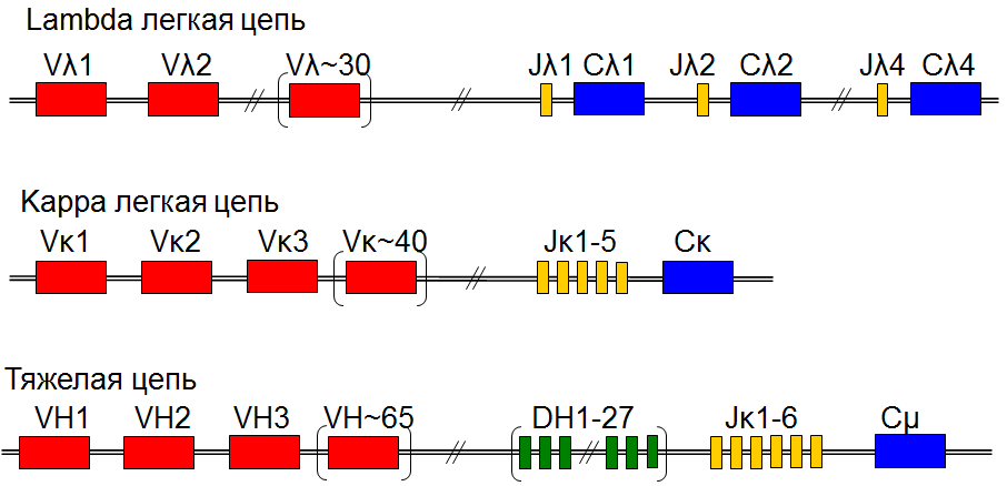 Схематическое изображение генетических локусов генов иммуноглобулина тяжелой цепи и двух легких цепей. Указано количество V, D, J генных сегментов.